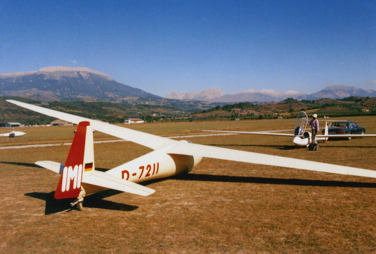 Schleicher Ka6cr